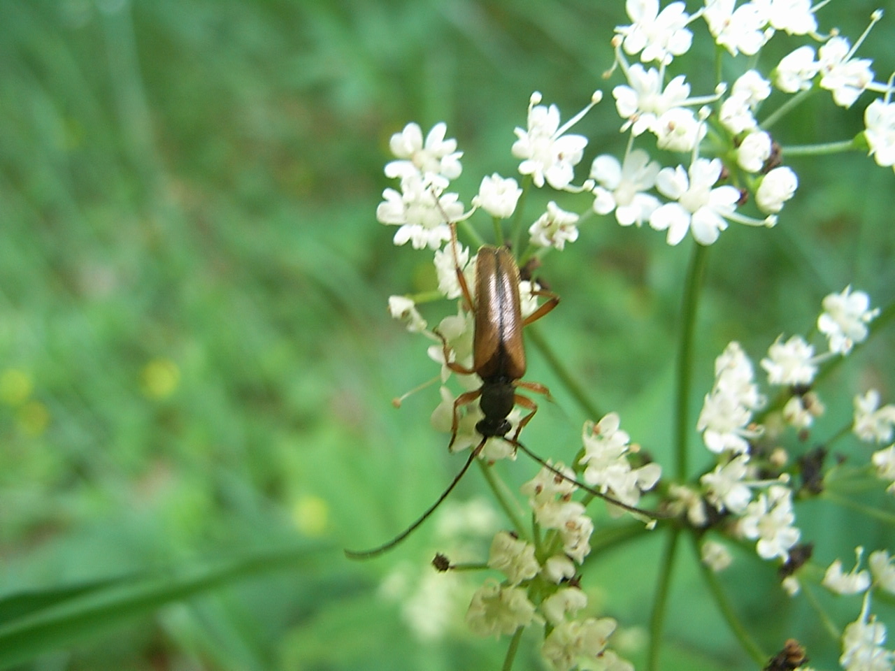 Alosterna tabacicolor, Zwieslerwaldhaus